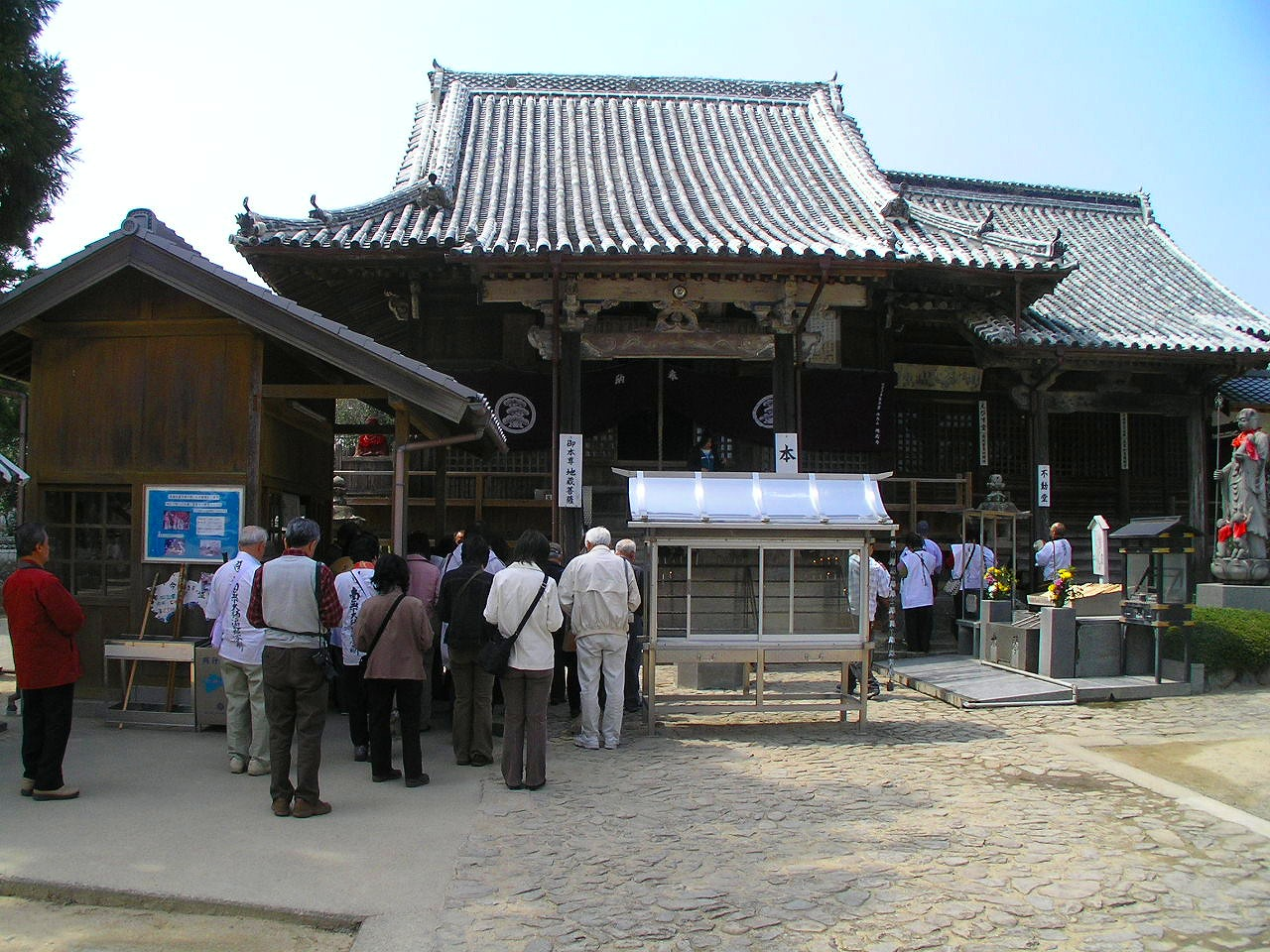 地蔵寺5番本堂 地蔵寺（じぞうじ）は徳島県板野郡板野町にある真言宗御室派の寺院。四国八十八箇所霊場の第5番札所。無尽山（むじんざん）荘厳院（しょうごんいん）と号する。本尊は勝軍地蔵菩薩。 奥の院の羅漢堂（五百羅漢）が有名。